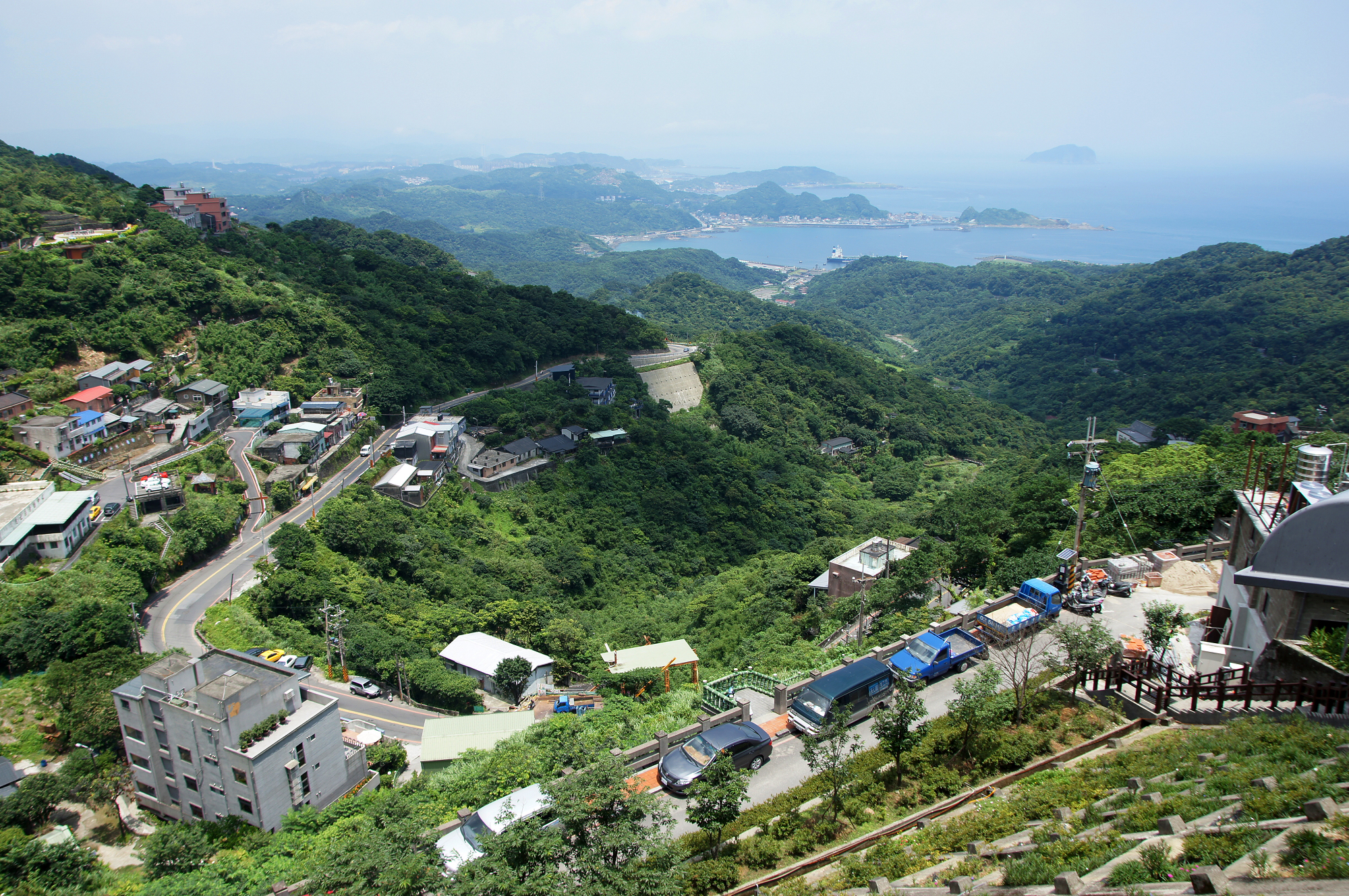 中文（台灣）: 九份山海景